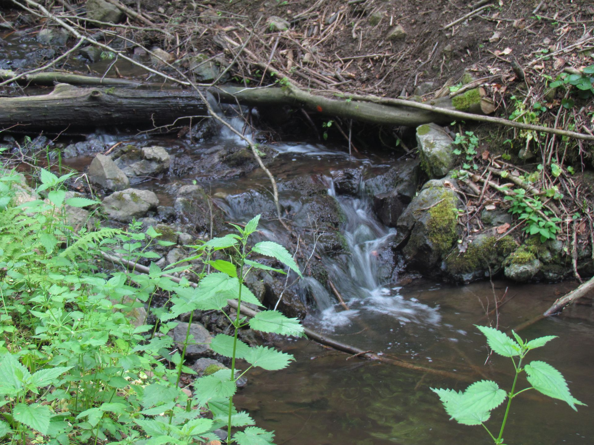 Detail Skryjského potoka nedaleko jeho prameniště.